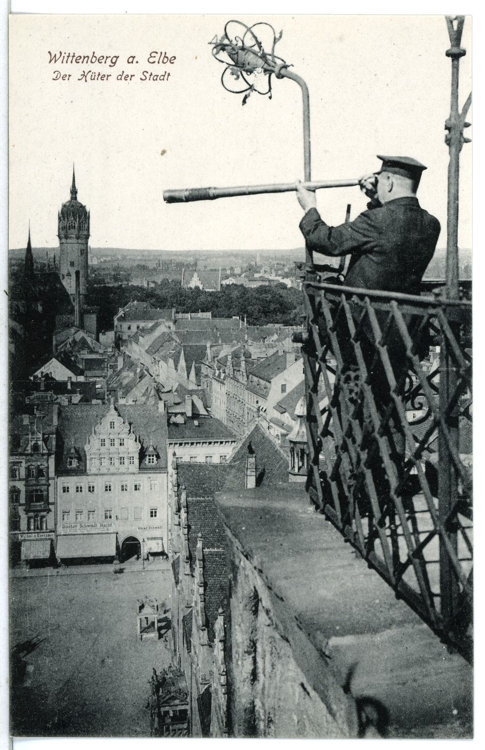 Wittenberg; Der Hüter der Stadt This postcard is from publisher Brück & Sohn in Meißen ( postcard has a unique number 12846 and is available in a higher resolution at the publisher. This images was uploaded in a cooperation project between Wikipedians and the publisher.